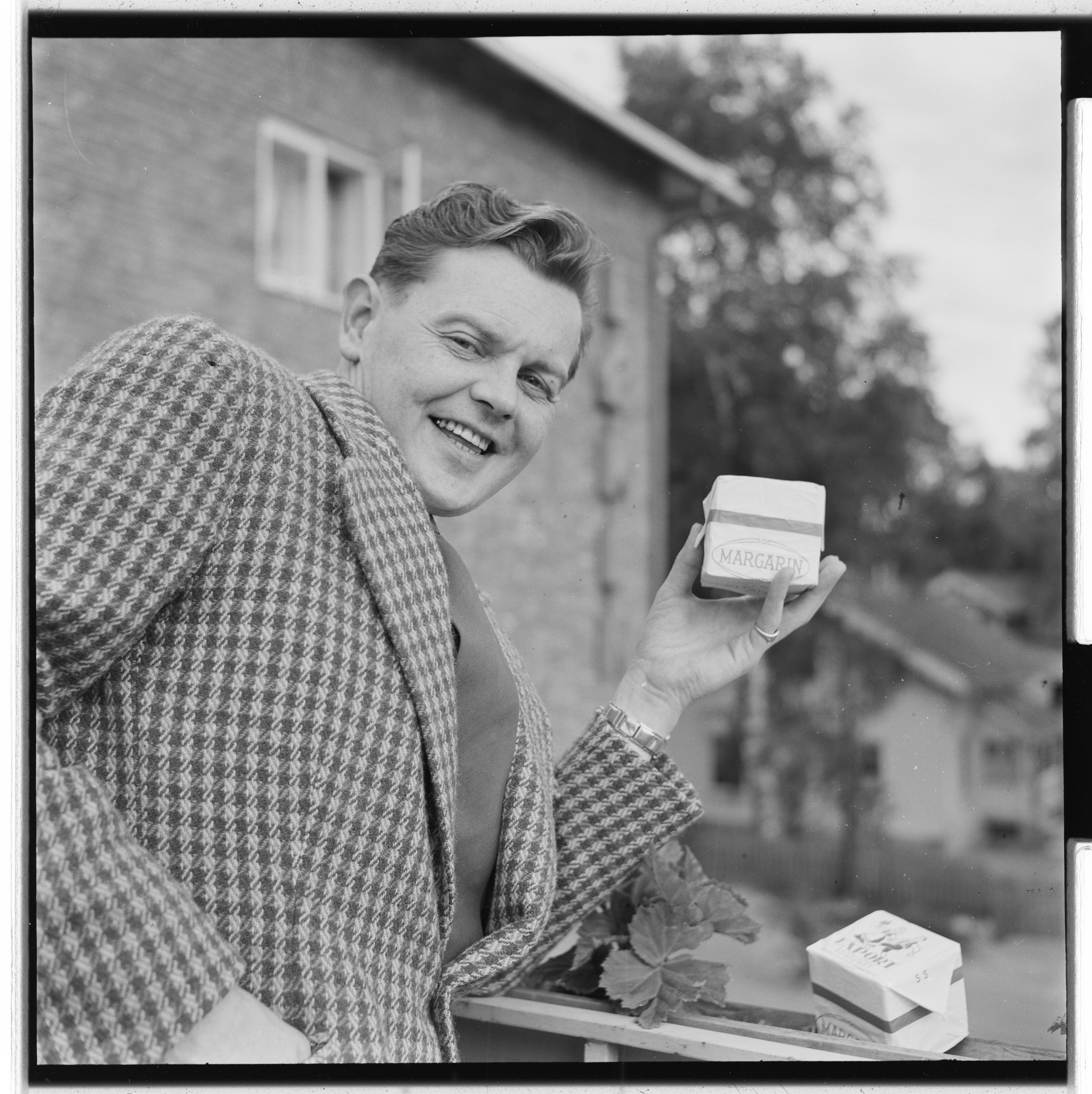 Bildet er hentet fra Arkivverket. Margarinhandel hos kjøpmann Per Løken på Magnor. Per Løken slo seg opp på handel med svenskene etter at handelsrestriksjonene ble opphevet etter krigen. Han fikk tilnavnet "margarinkongen". NÅ nr. 17, 1954 Arkivinstitusjon : Riksarkivet Arkivnavn : Billedbladet NÅ Sted : Norge, Hedmark, Eidsskog, Magnor Emneord: Handel, Grensehandel Avbildet